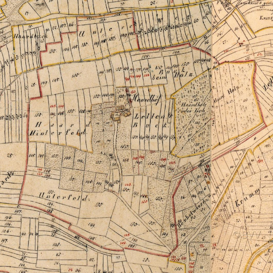 Kataster mit der Gemarkung Haardhöf (ehemaliger Ortsteil von Röckingen)